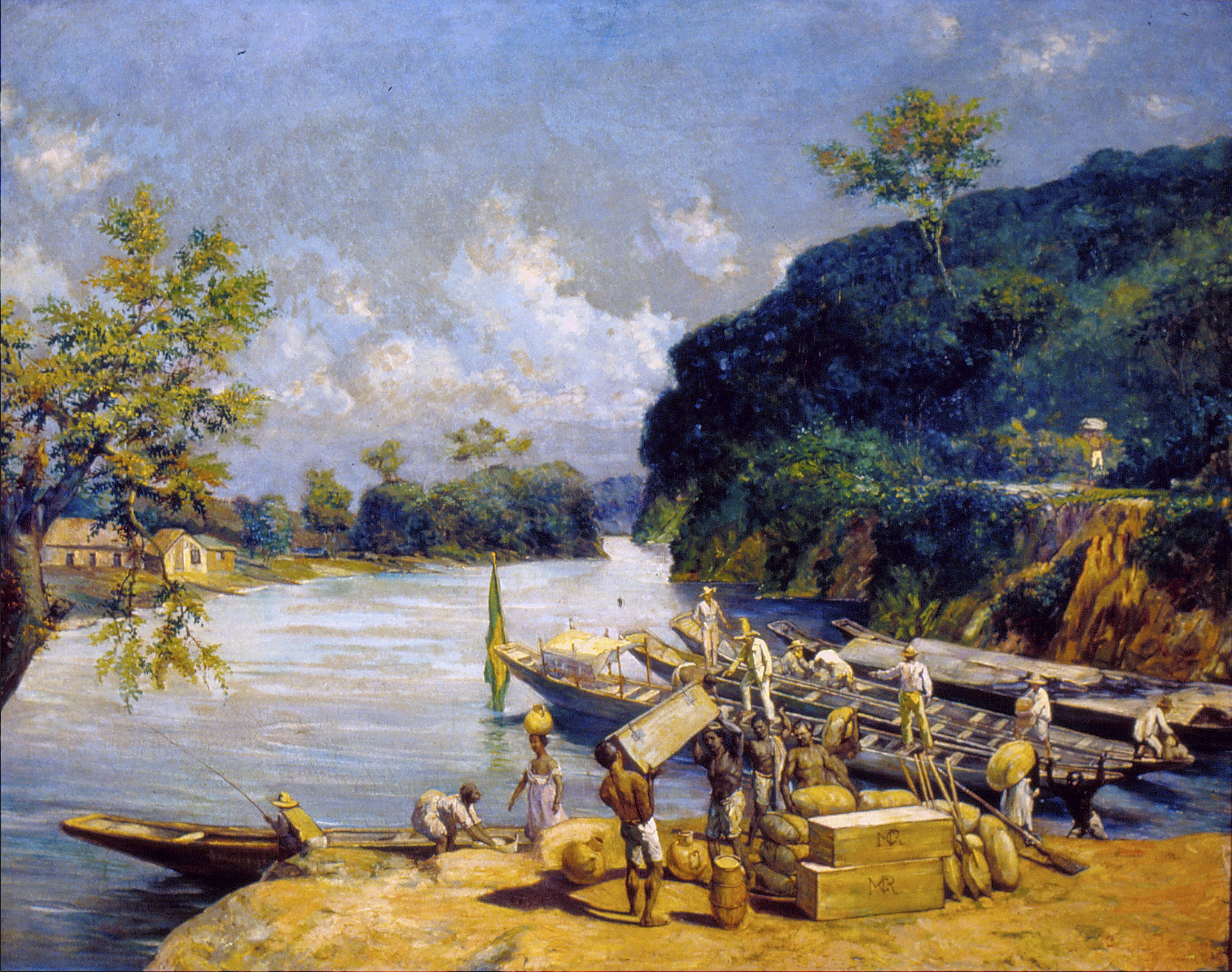 Obra que integra o acervo do Museu Paulista da USP. Coleção Fundo Museu Paulista - FMP